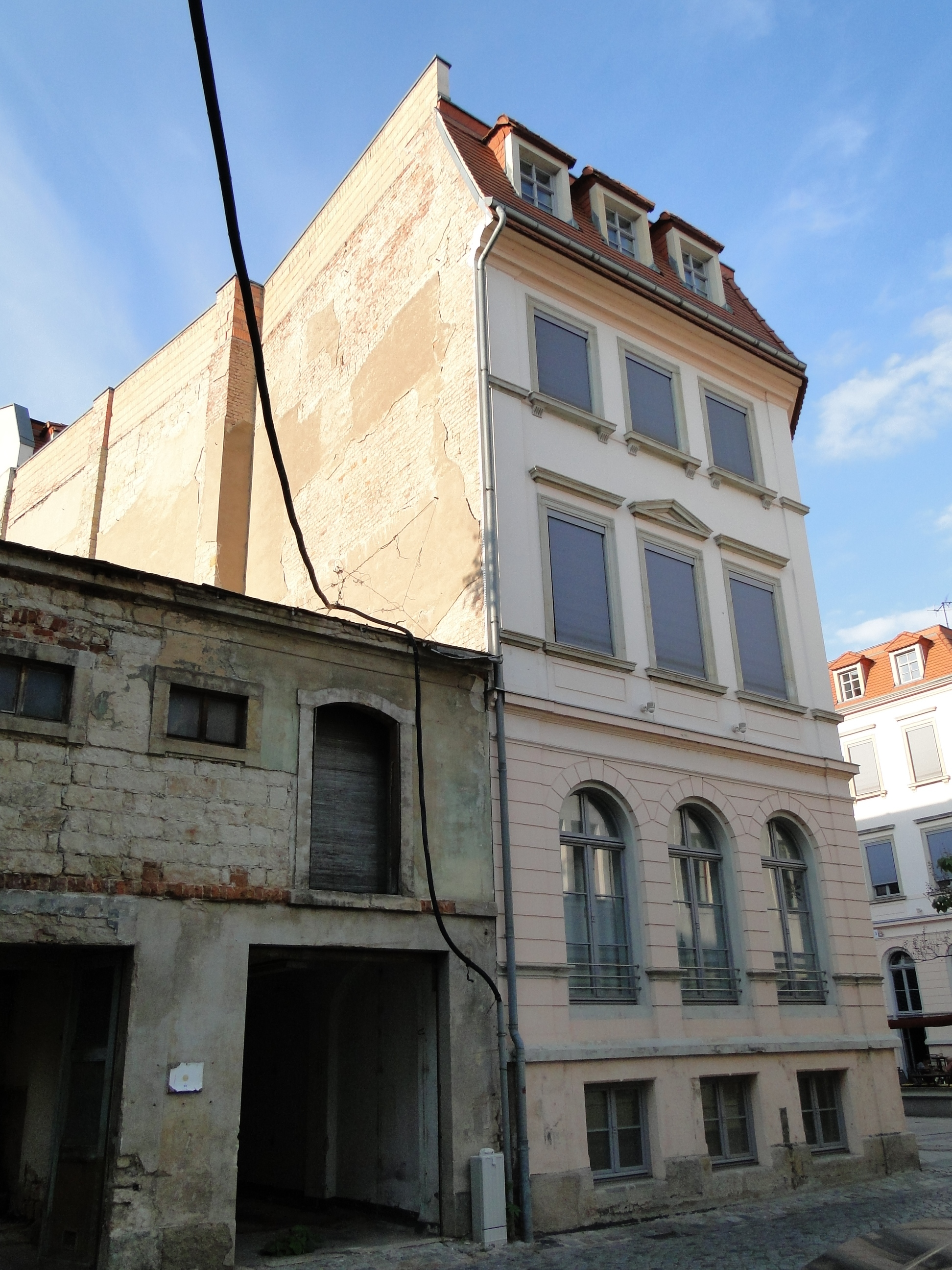 Kulturdenkmal Wallgäßchen 2 Dresden